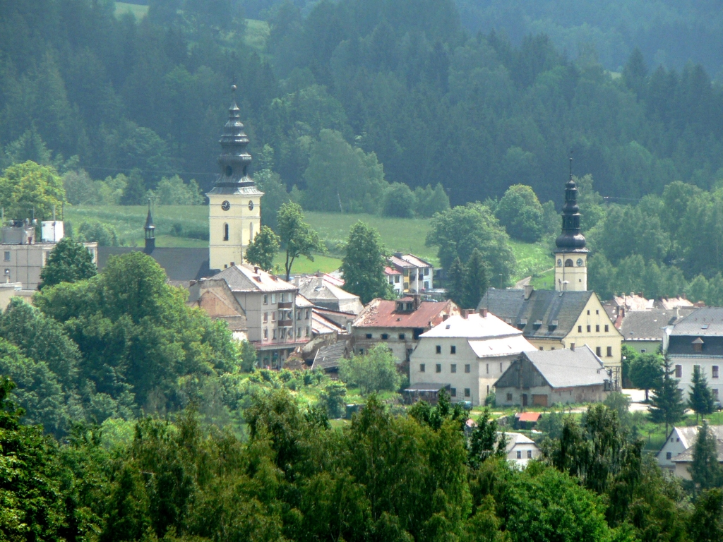 Pohled na centrum Starého Města pod Sněžníkem